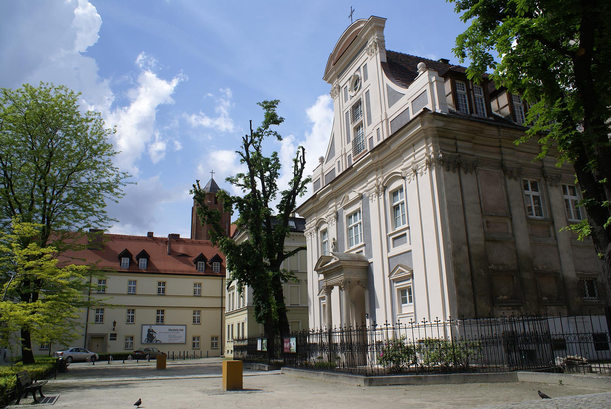 Wrocław, klasztor, 1257, 1696-1699, XIX, po 1945